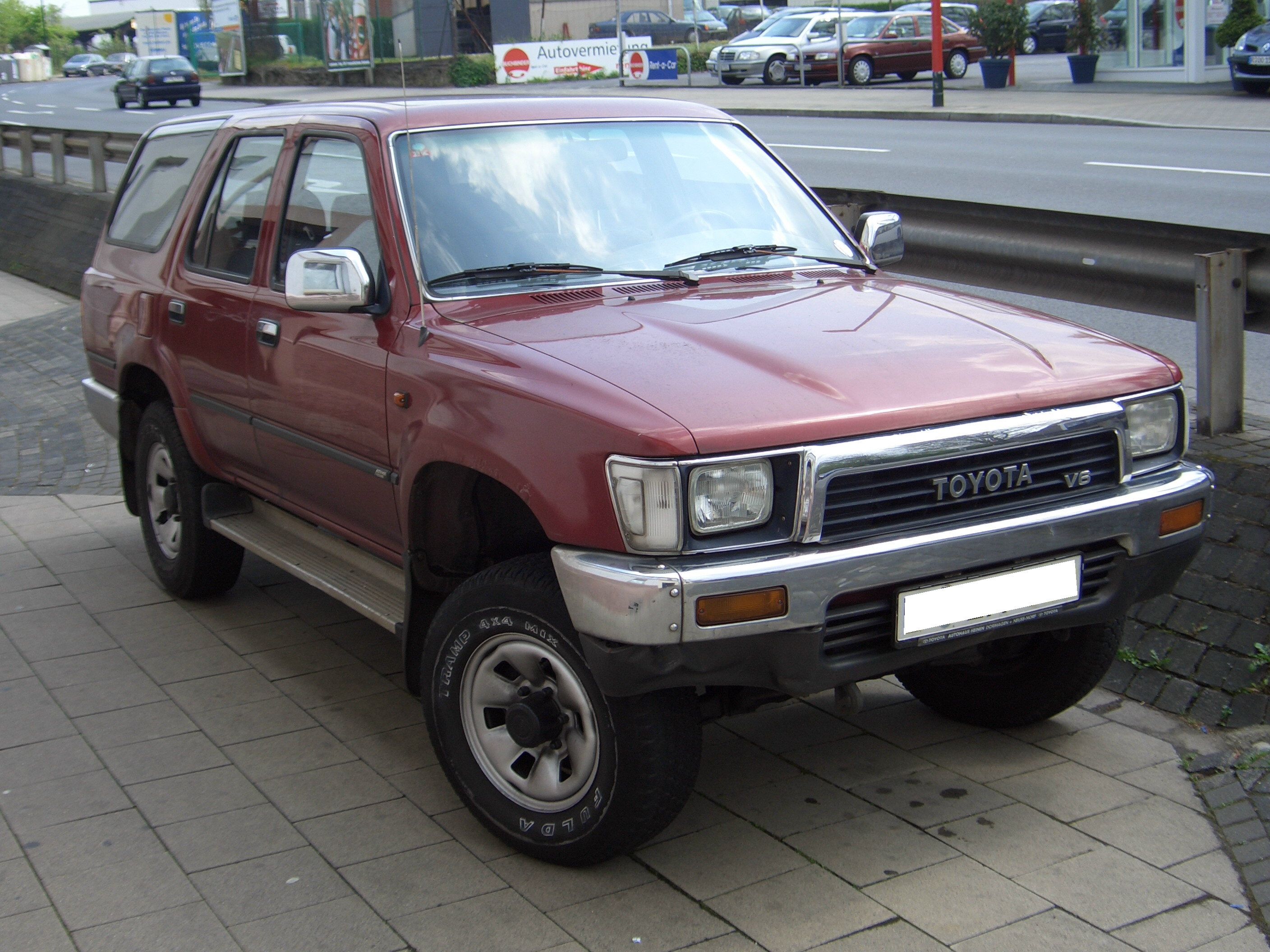 Toyota 4Runner (Europe), Gen2 1990-1991, seen in Duesseldorf, Germany